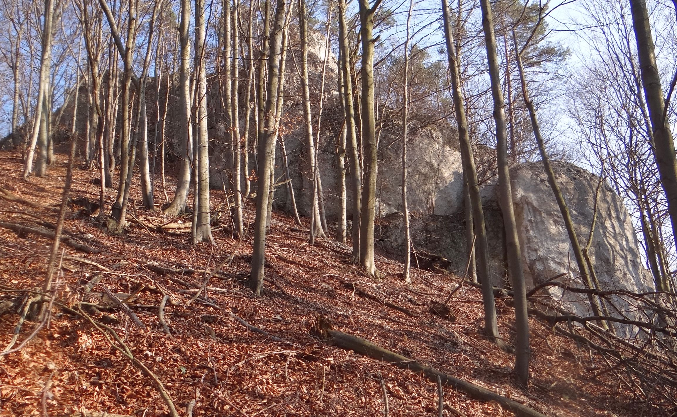 Rybne Skały w Dolinie Będkowskiej